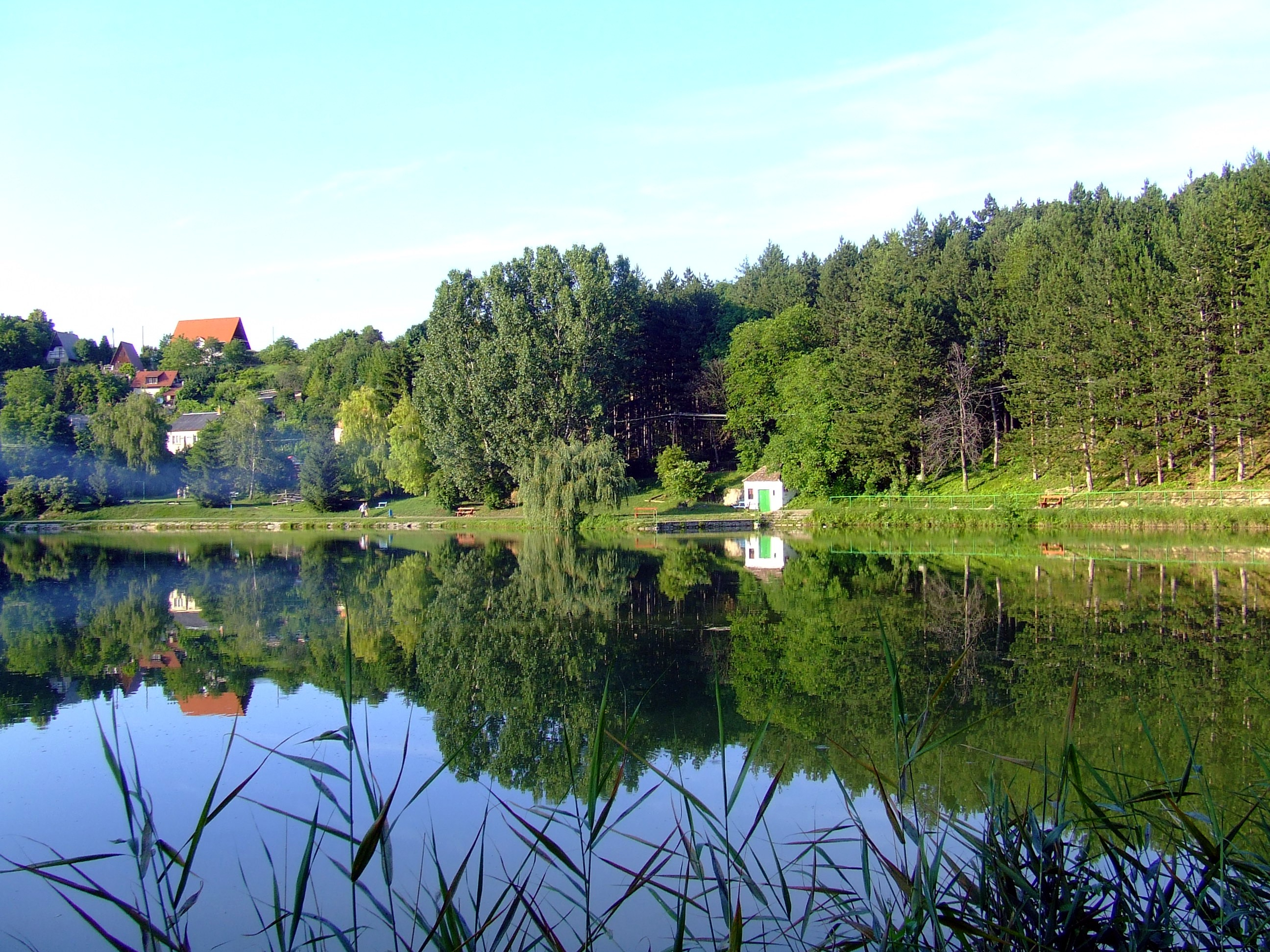 Dombay-tó, Baranya megye